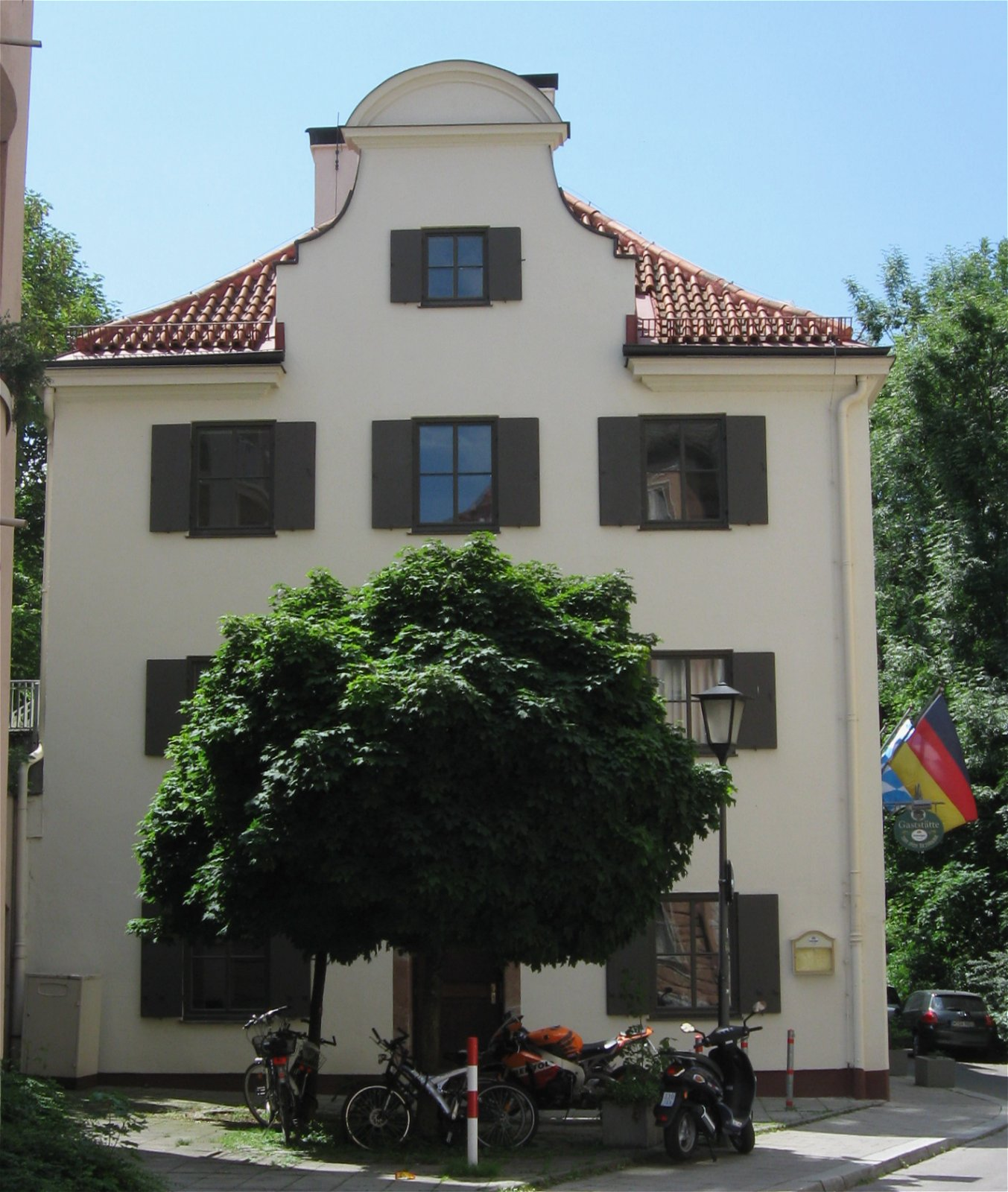 Haus des Deutschen Ostens